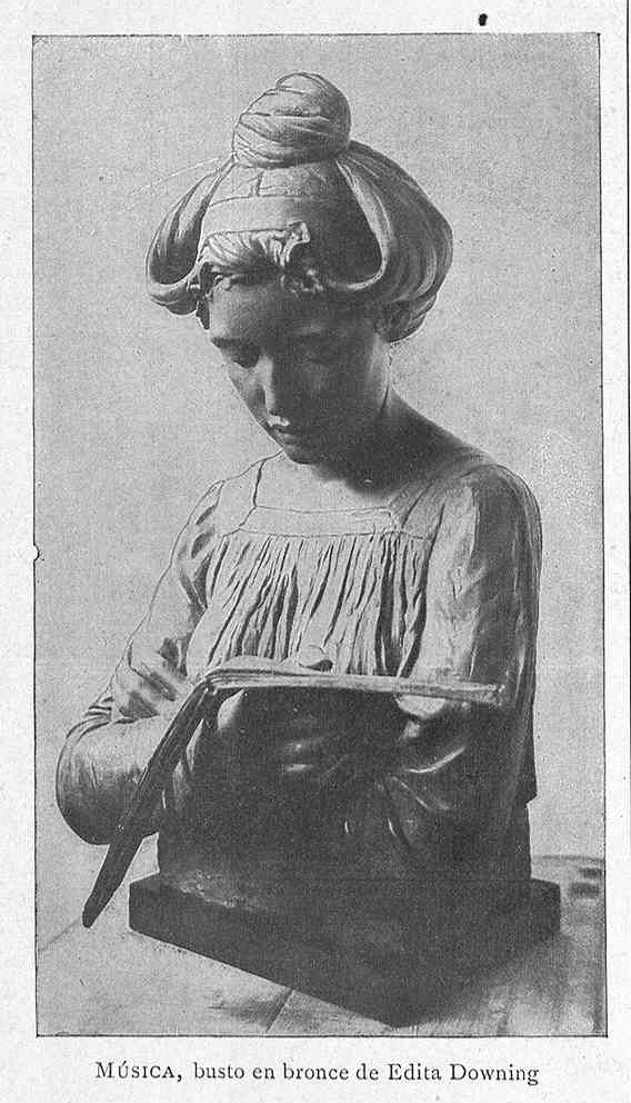 Música. Busto en bronce de Edita Downing.